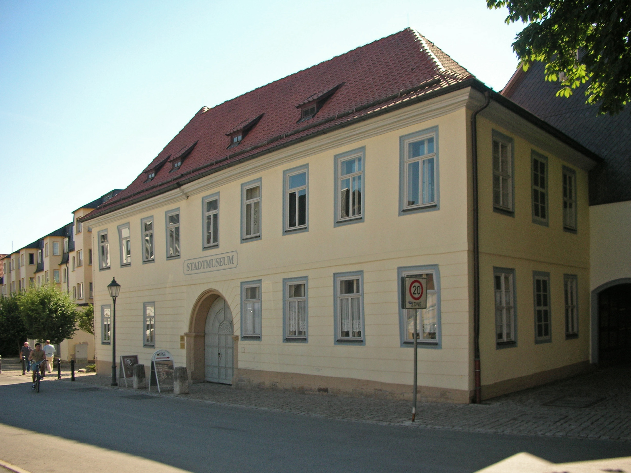 Hildburghausen, Stadtmuseum (museum of the town's history)